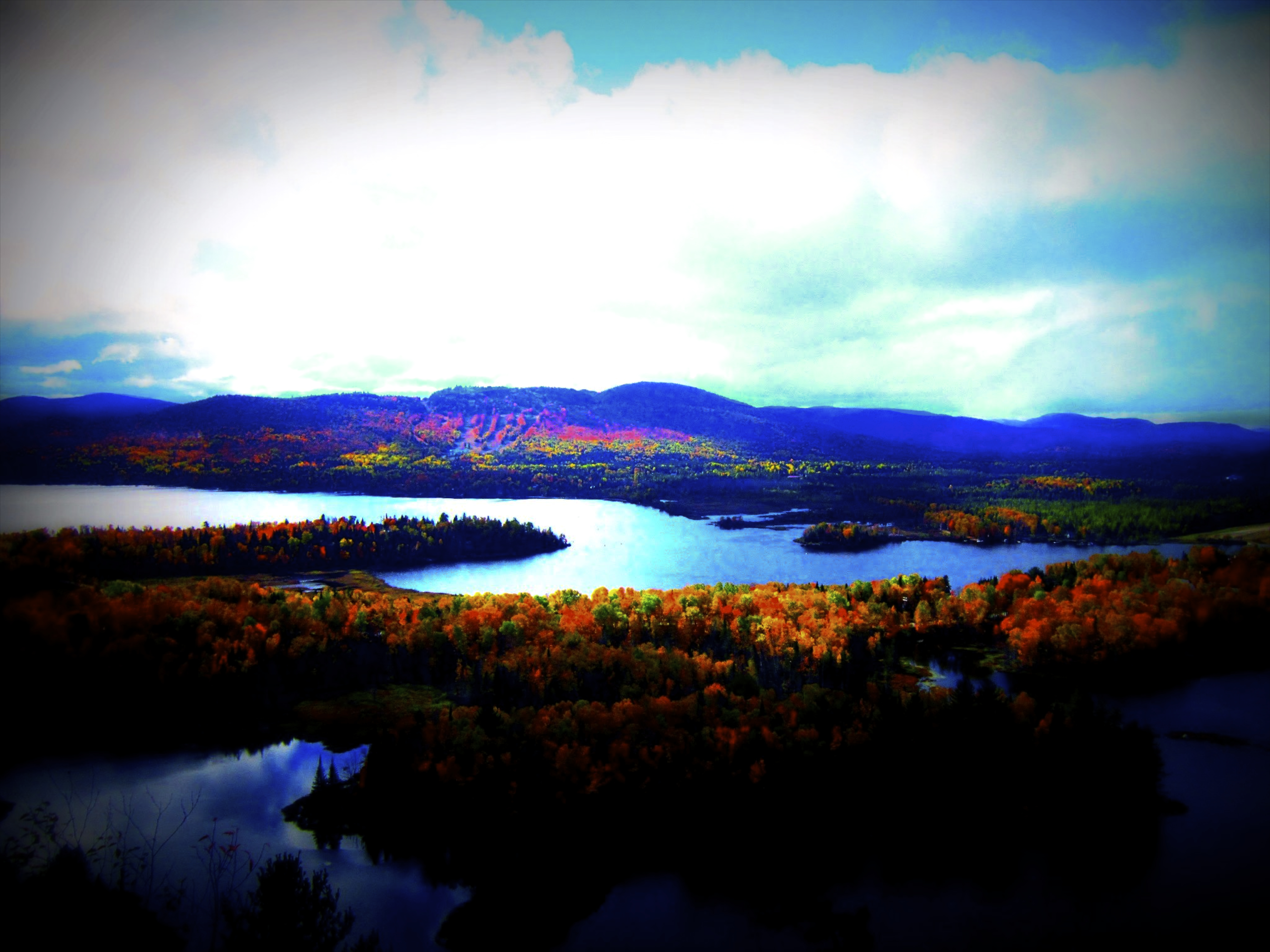 Paysage